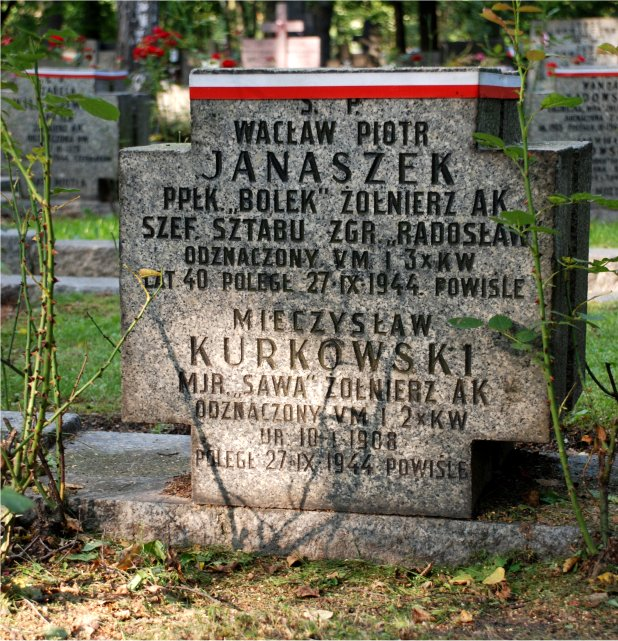 Warszawa, Powązki: Wacław Janaszek, Mieczysław Kurkowski